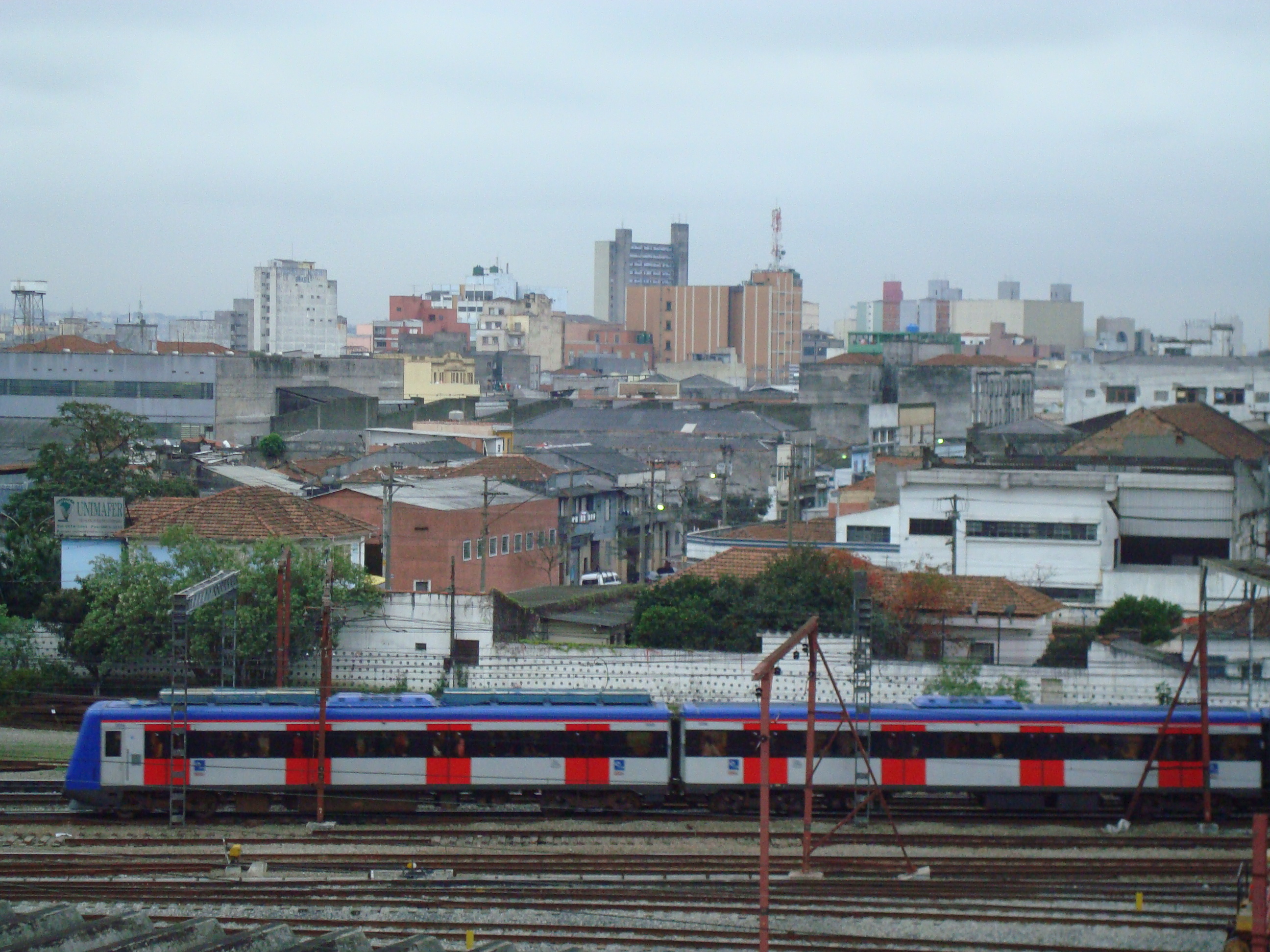 Bairro do Brás, com visão no sentido de Guarulhos a partir da Estação Brás do Metrô.